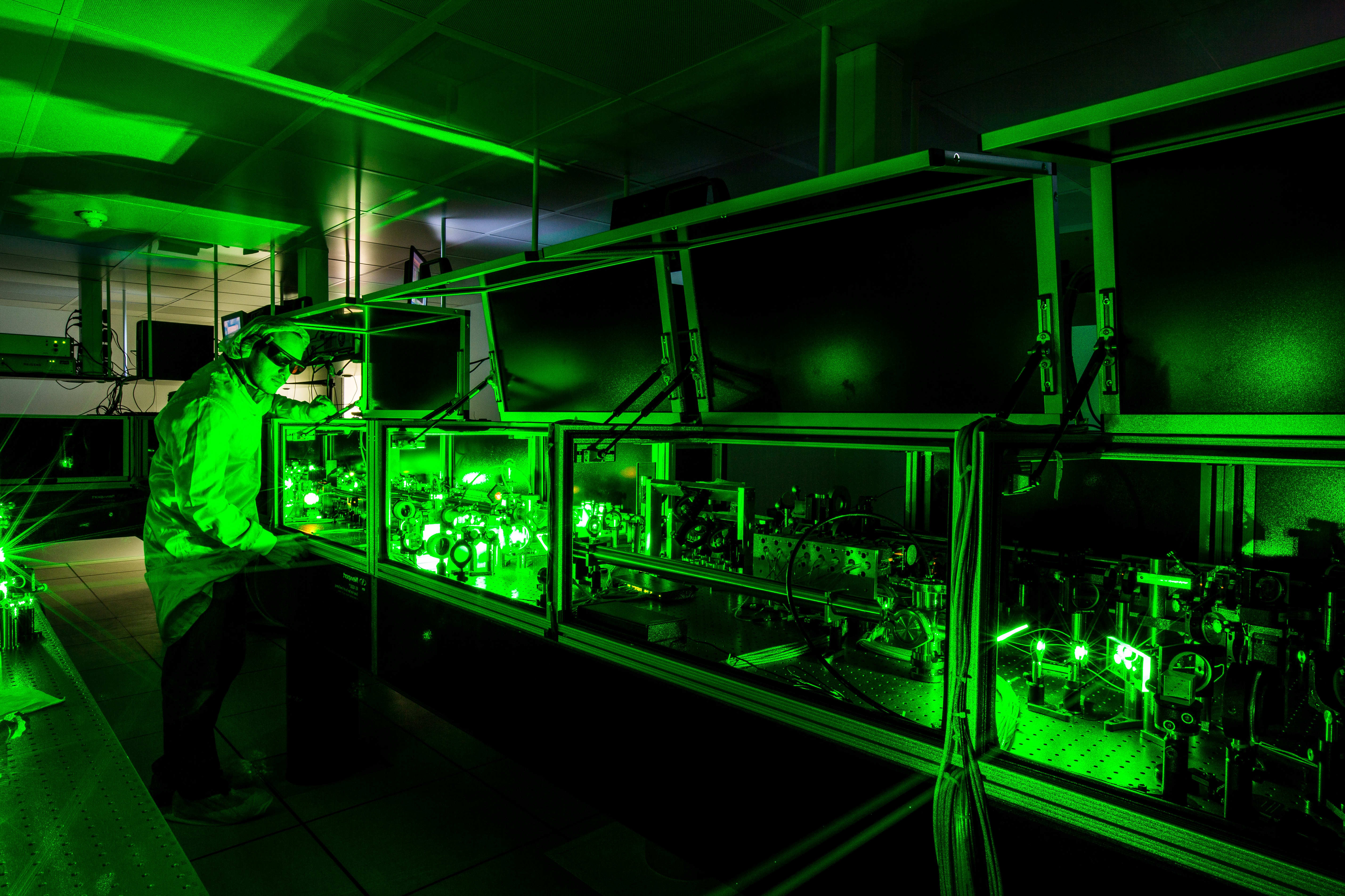 Le Laboratoire d'Optique Appliquée (LOA) est une UMR (Unité Mixte de Recherches) ENSTA - CNRS - École Polytechnique. Ses activités de recherche couvrent un large spectre scientifique centré sur le développement et les applications de sources lasers ultrabrefs, la physique de l'interaction laser-matière et des plasmas, ainsi que la production de sources compactes de rayonnements et de particules énergétiques.